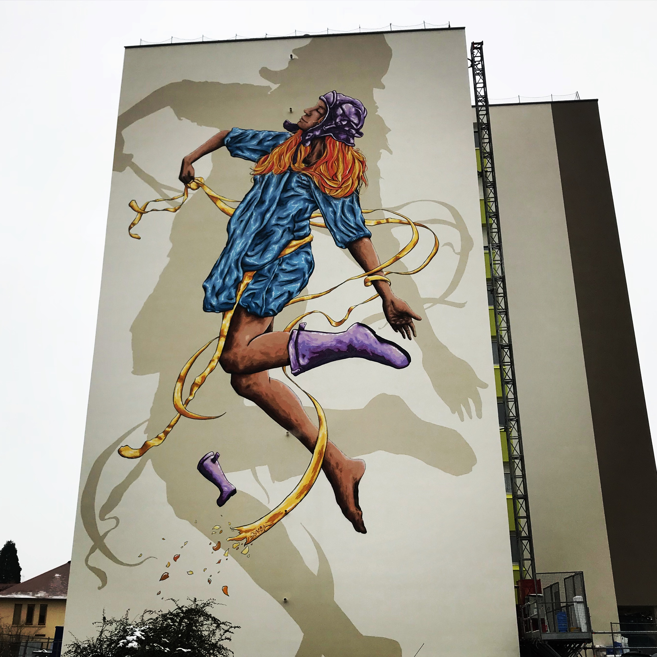 Fresque réalisée par Sakew, sur un bâtiment Epinal Habitat (88)